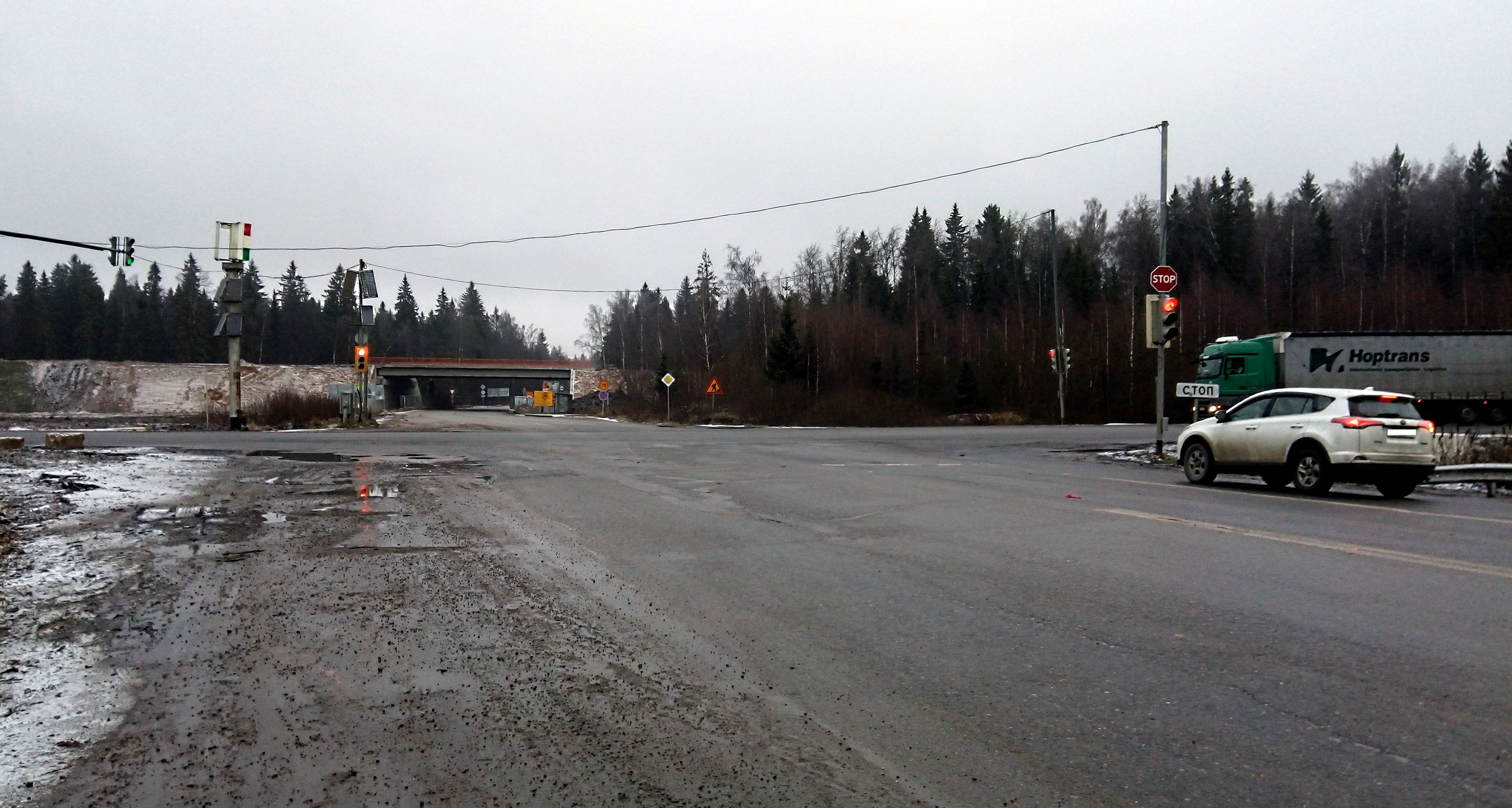 Пересечение с ММК и будущей ЦКАД